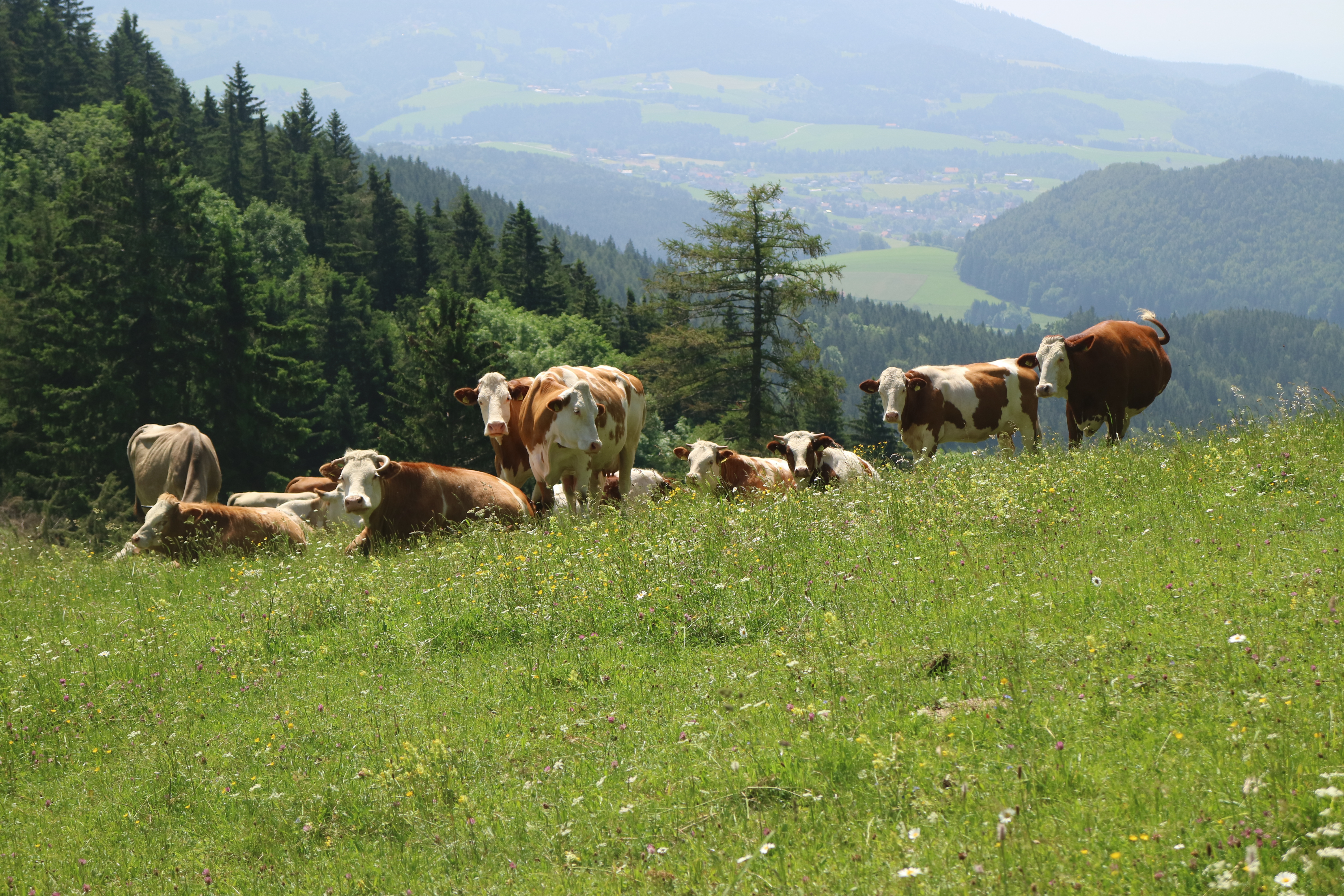 Kuhherde am Hochtrötsch mit Blick ins Semriacher Becken, Marktgemeinde Semriach (Steiermark)